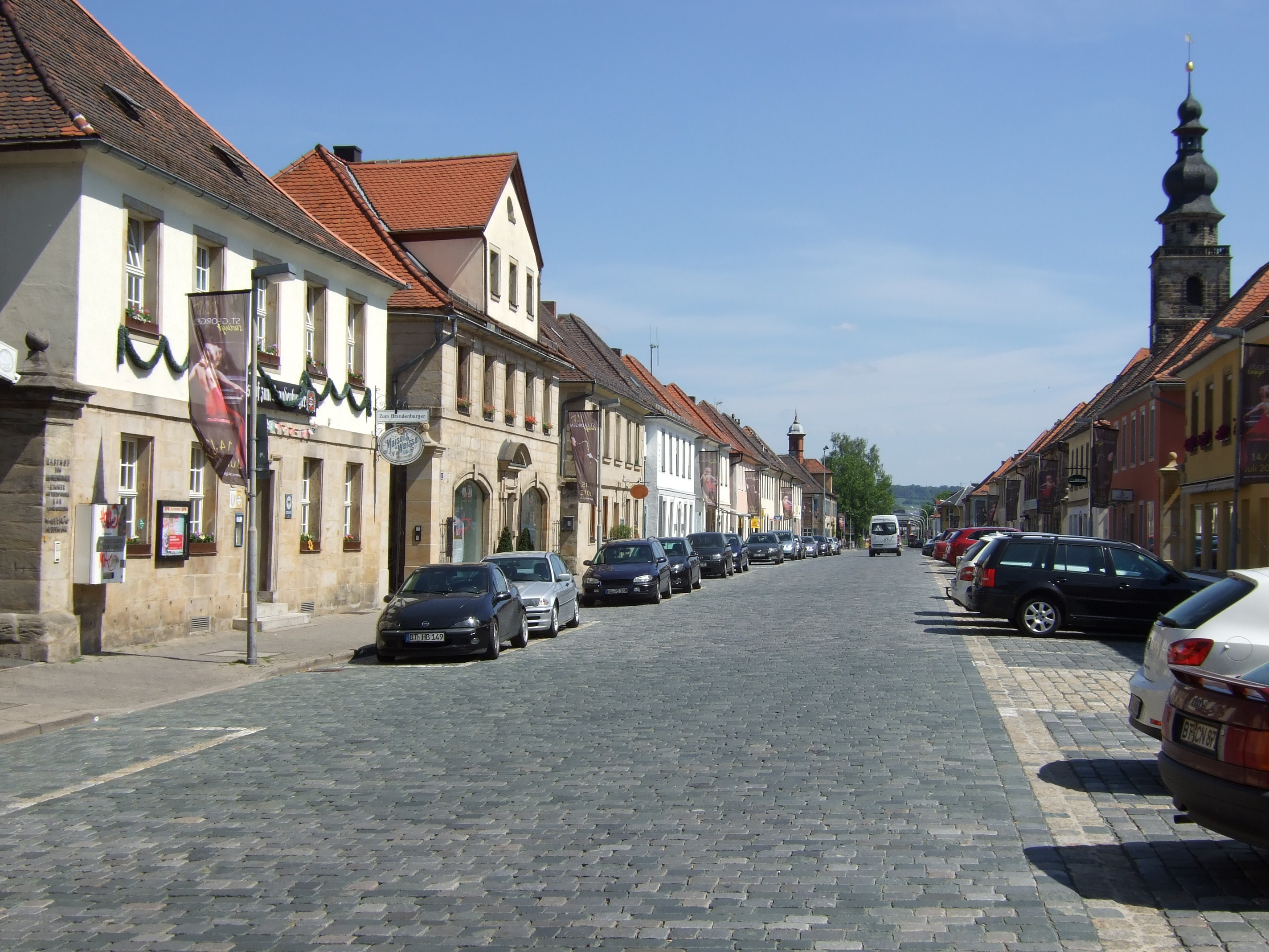 Straße Sankt Georgen Bayreuth